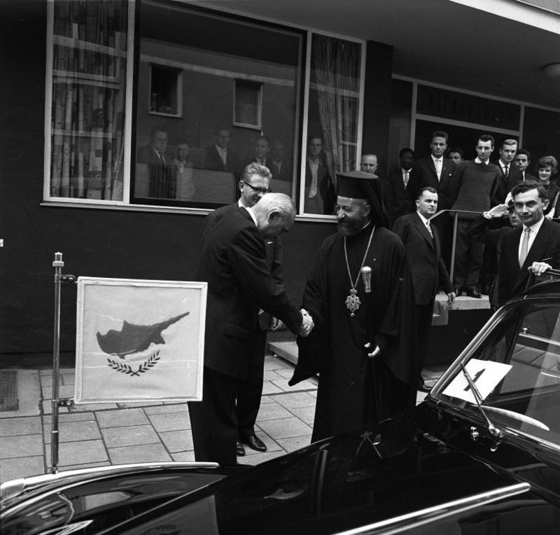 Staatsbesuch Zypern Abfahrt vom Wichern-Zöckler-Haus